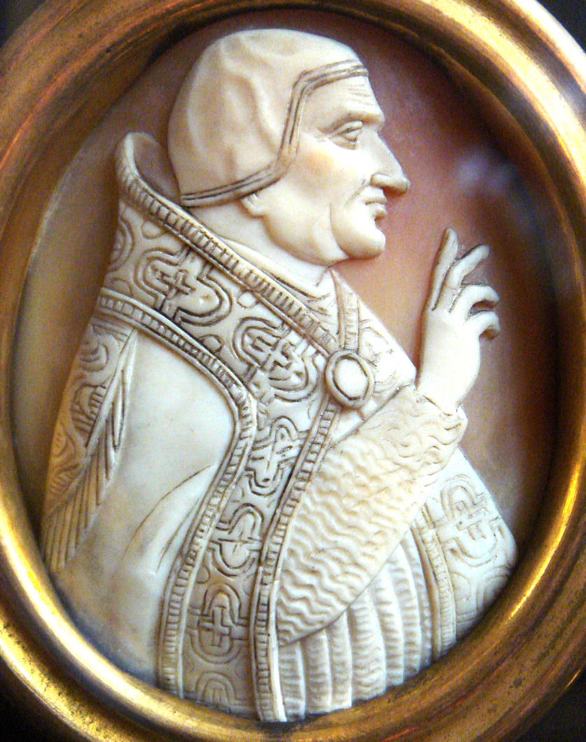 Pope Clement VI Cameo